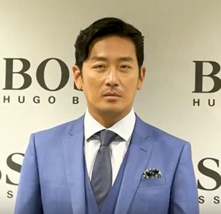 반전의 미소😊